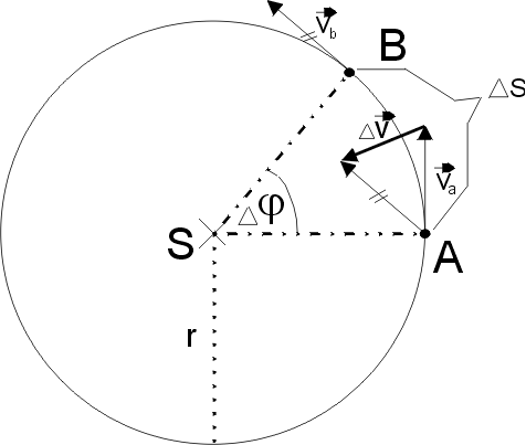 je to mé vlastní dílo.